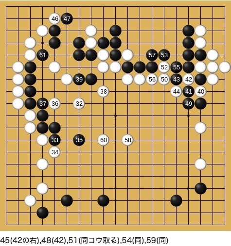 第16期本因坊戦第5局 坂田栄男 半目勝 高川格